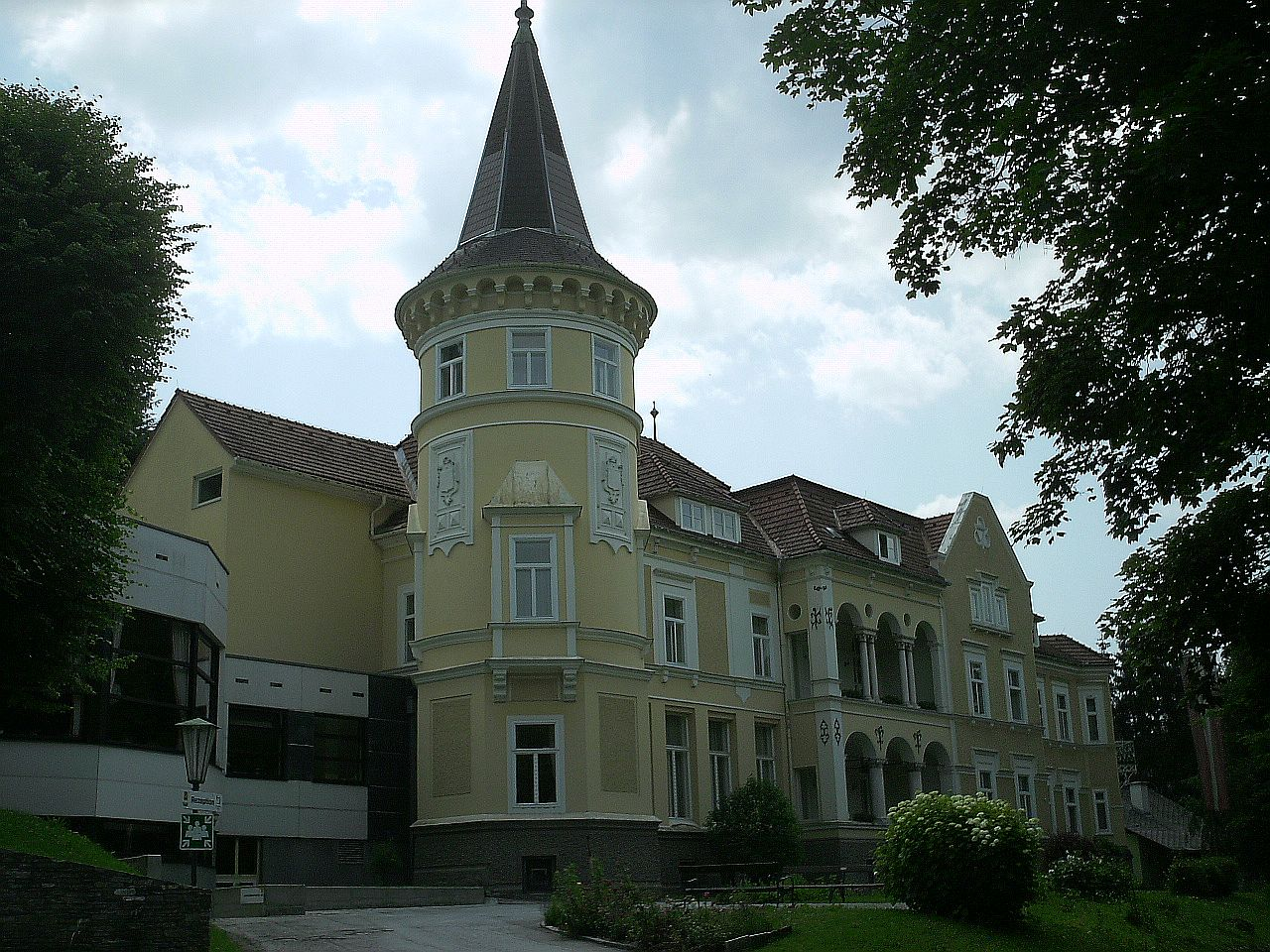 Schloss Sommerau, Franz-Jawornik-Heim des Kriegsoperverbandes Stmk. in Spital am Semmering/Österreich.